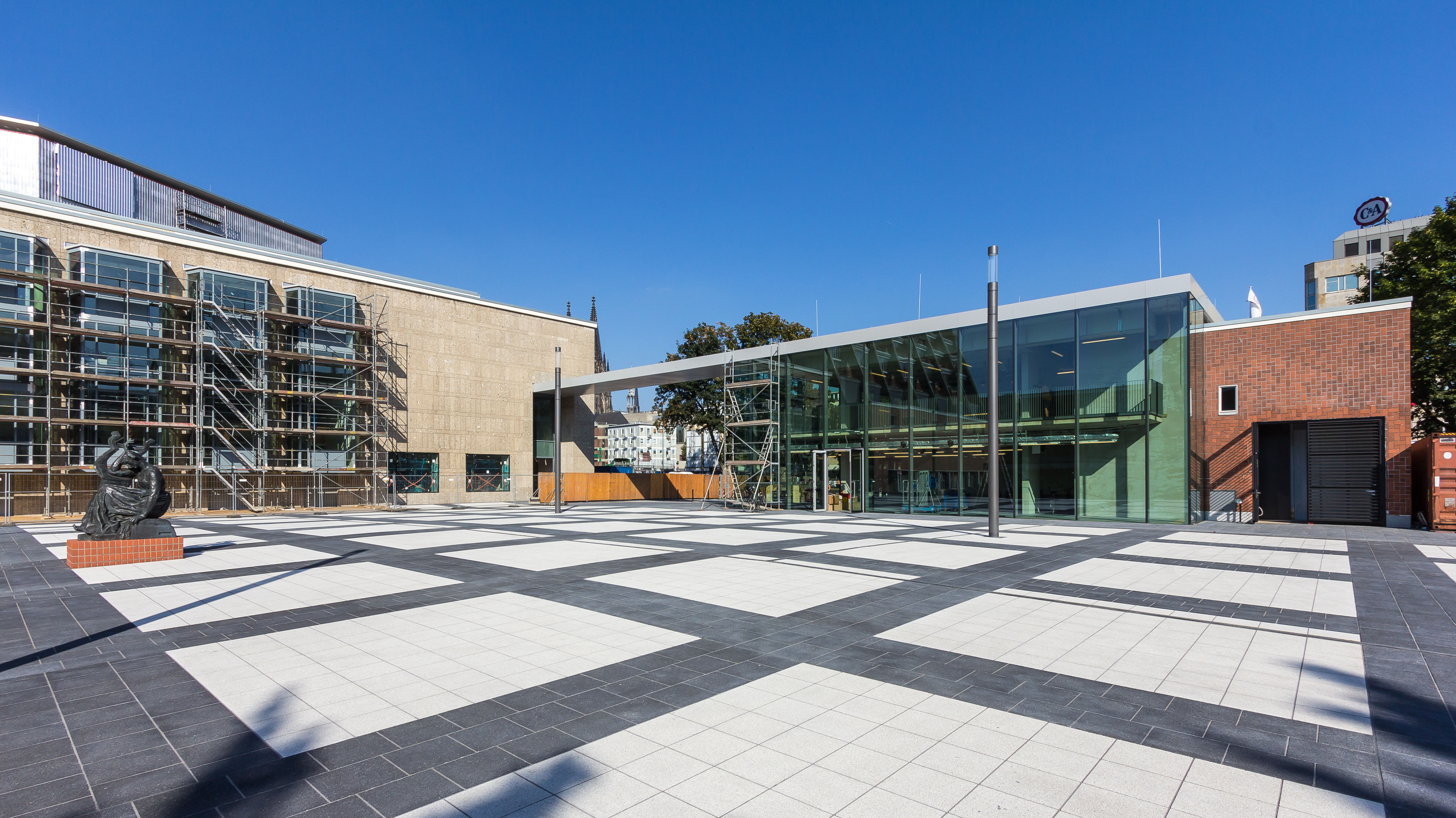 Kleiner Offennachplatz, Kleines Haus. Seit September 2016 nutzt das Schauspiel Köln die ehemaligen Opernterrasse unter dem Namen „Außenspielstätte am Offenbachplatz“. Links die Skulptur Sappho von Antoine Bourdelle